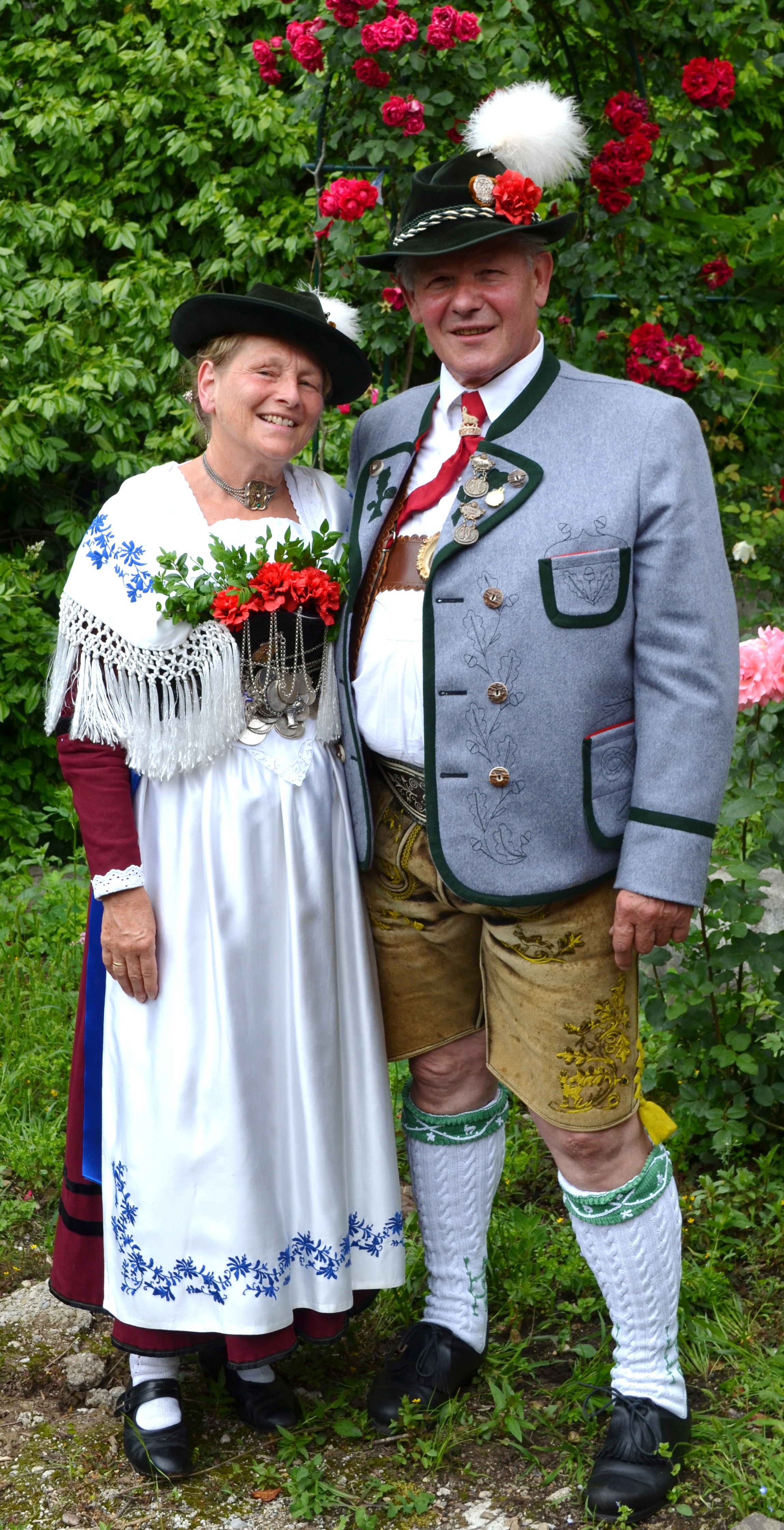 Werdenfelser Tracht wie sie von dem Trachtenverein GTEV D`Wetterstoana getragen wird